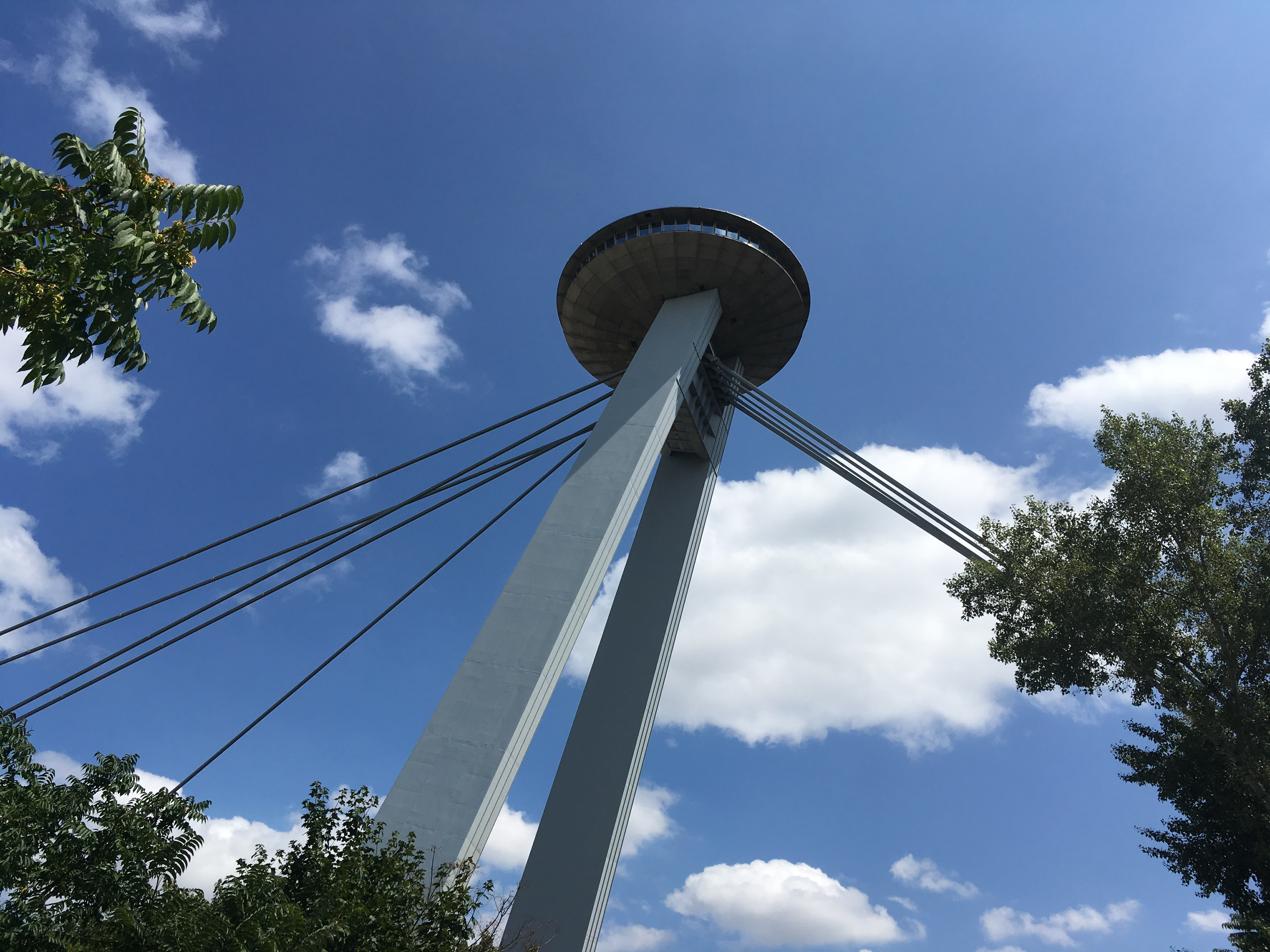 Photo du restaurant UFO du pont du soulèvement national slovaque à Bratislava